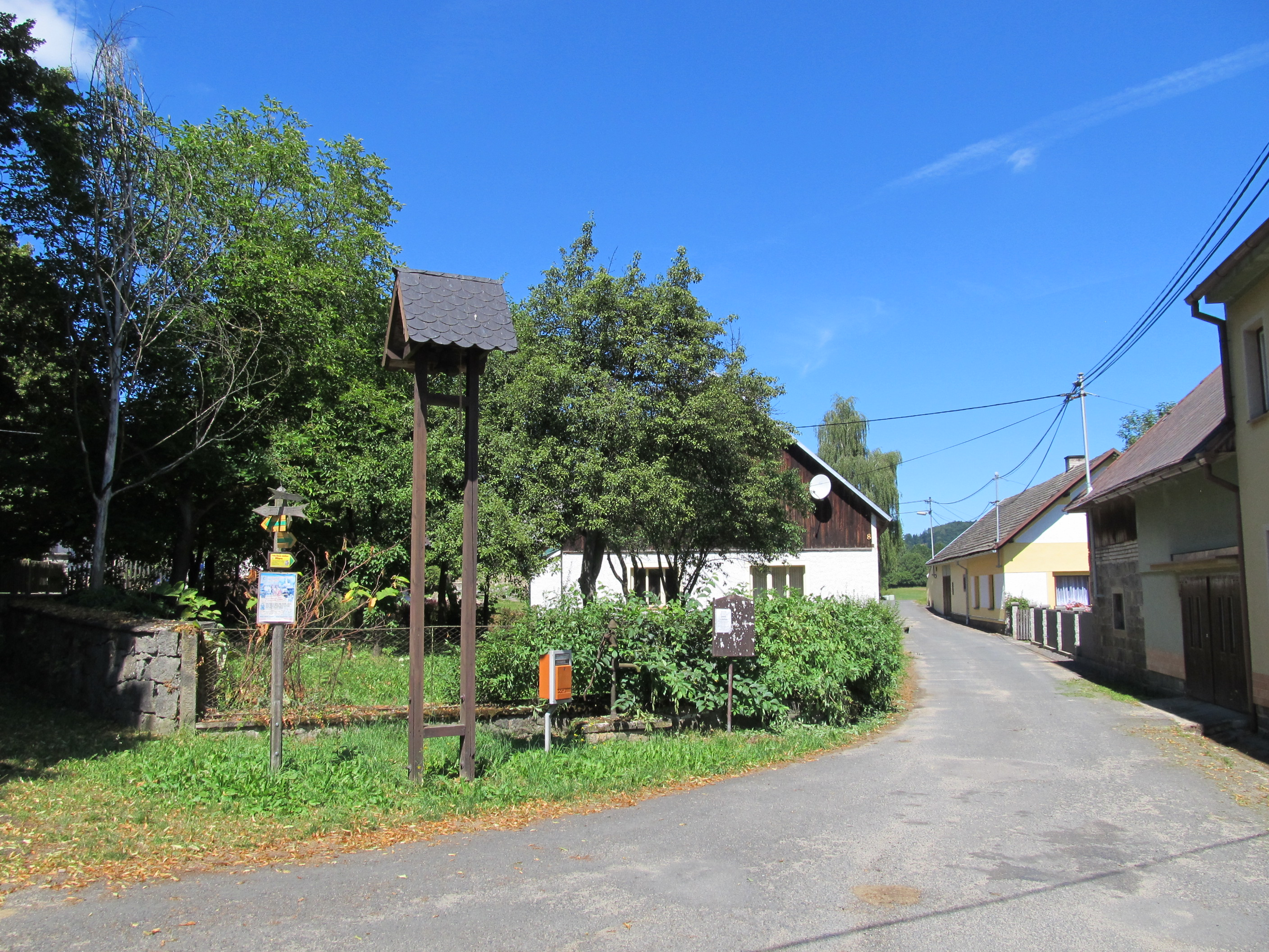 Sluhov